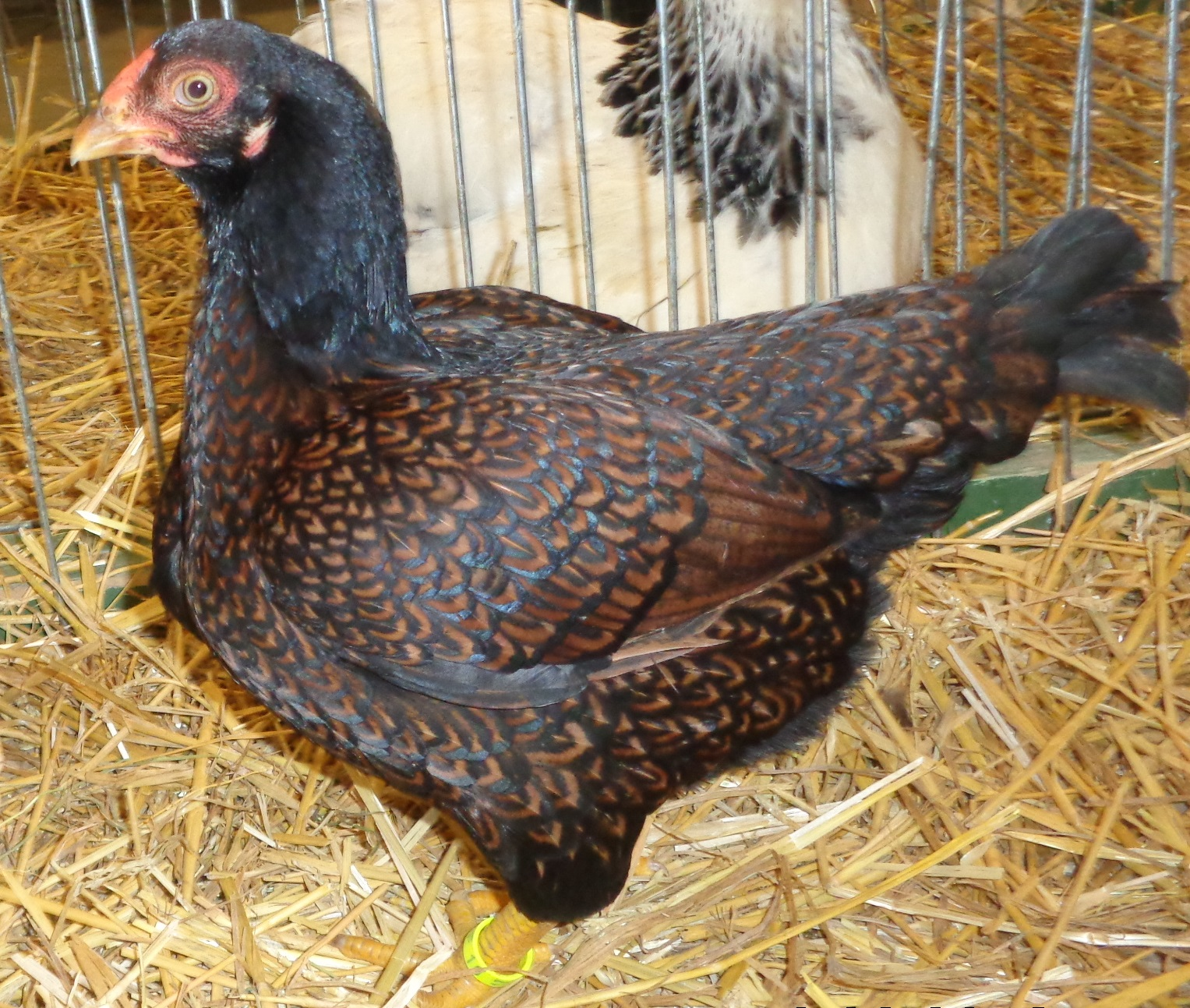 Poule